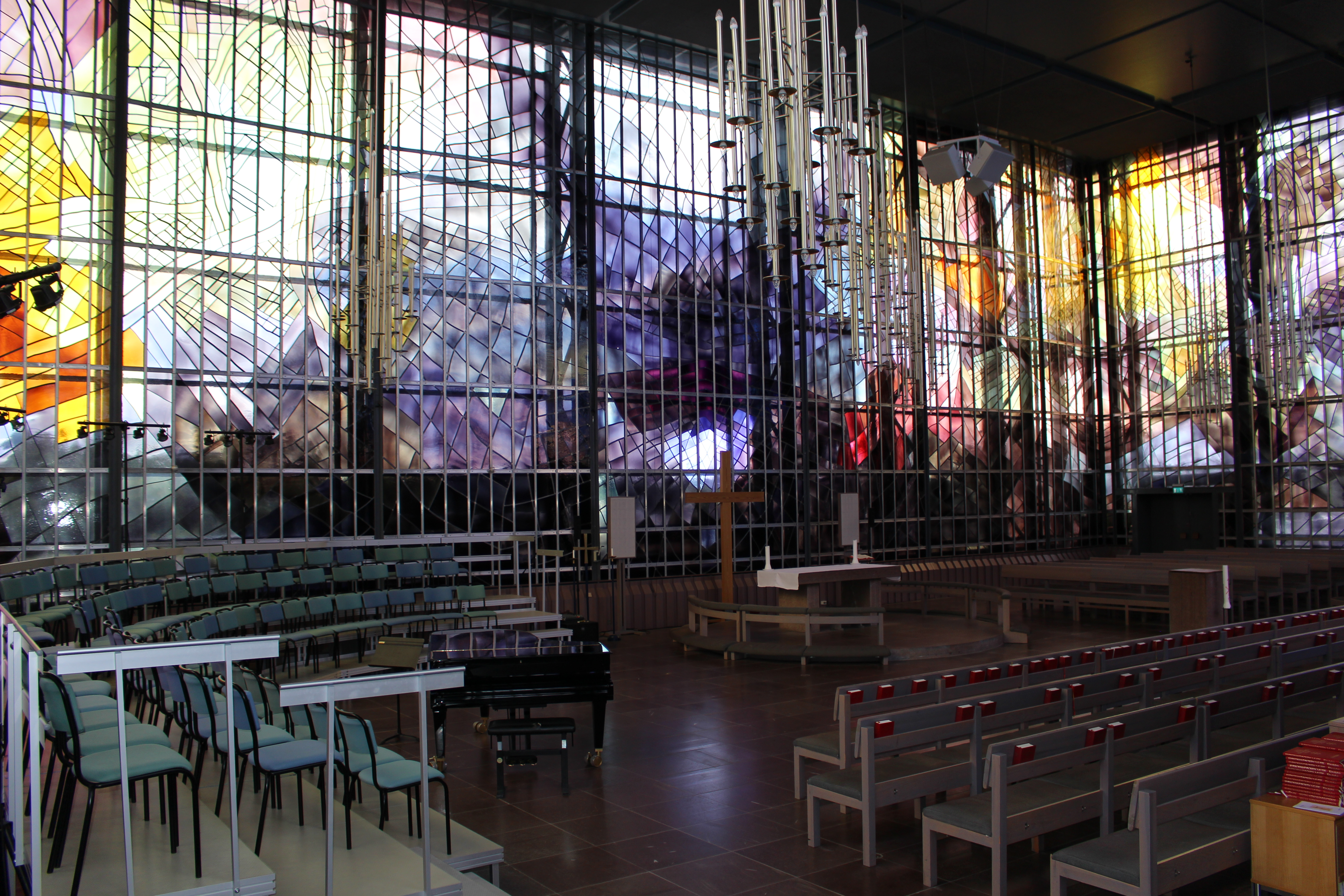 Kyrkorum i Tibble kyrka